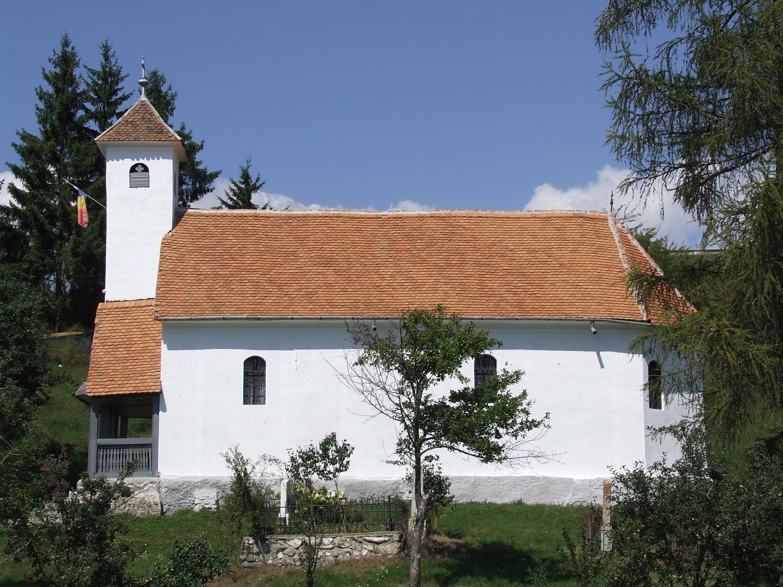 Biserica de lemn din Sândominic, județul Harghita.